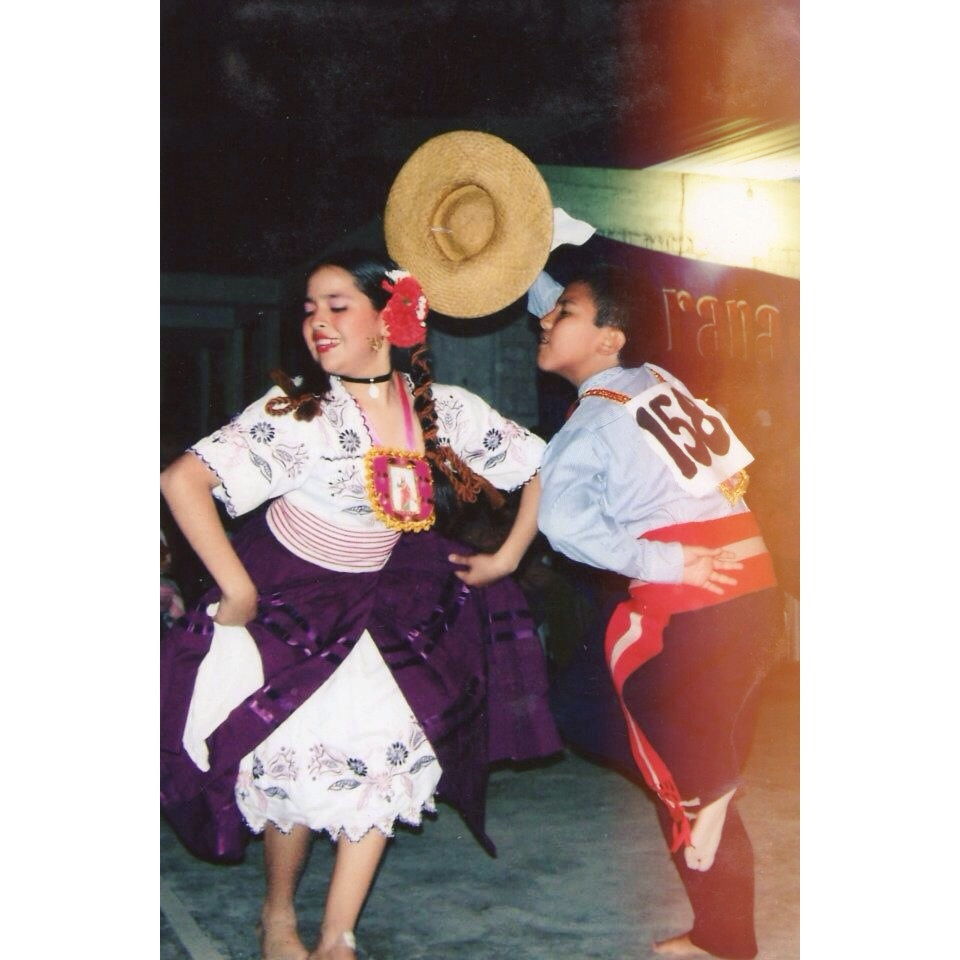 Tondero